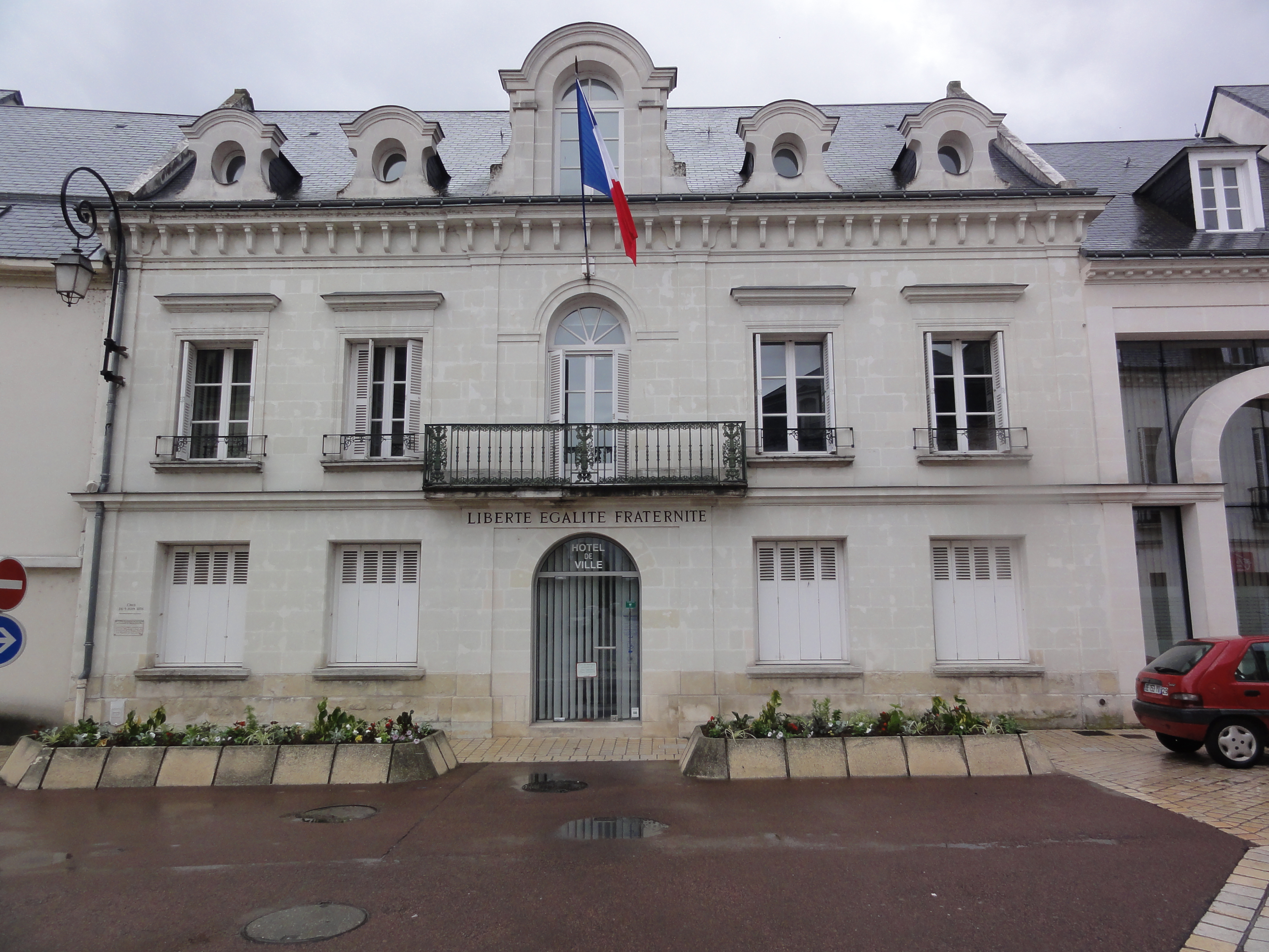 Saint-Avertin (Indre-et-Loire) Mairie